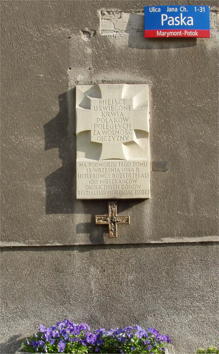 Miejsce pamięci przy ul. Paska na Marymoncie w Warszawie (fot Zu)